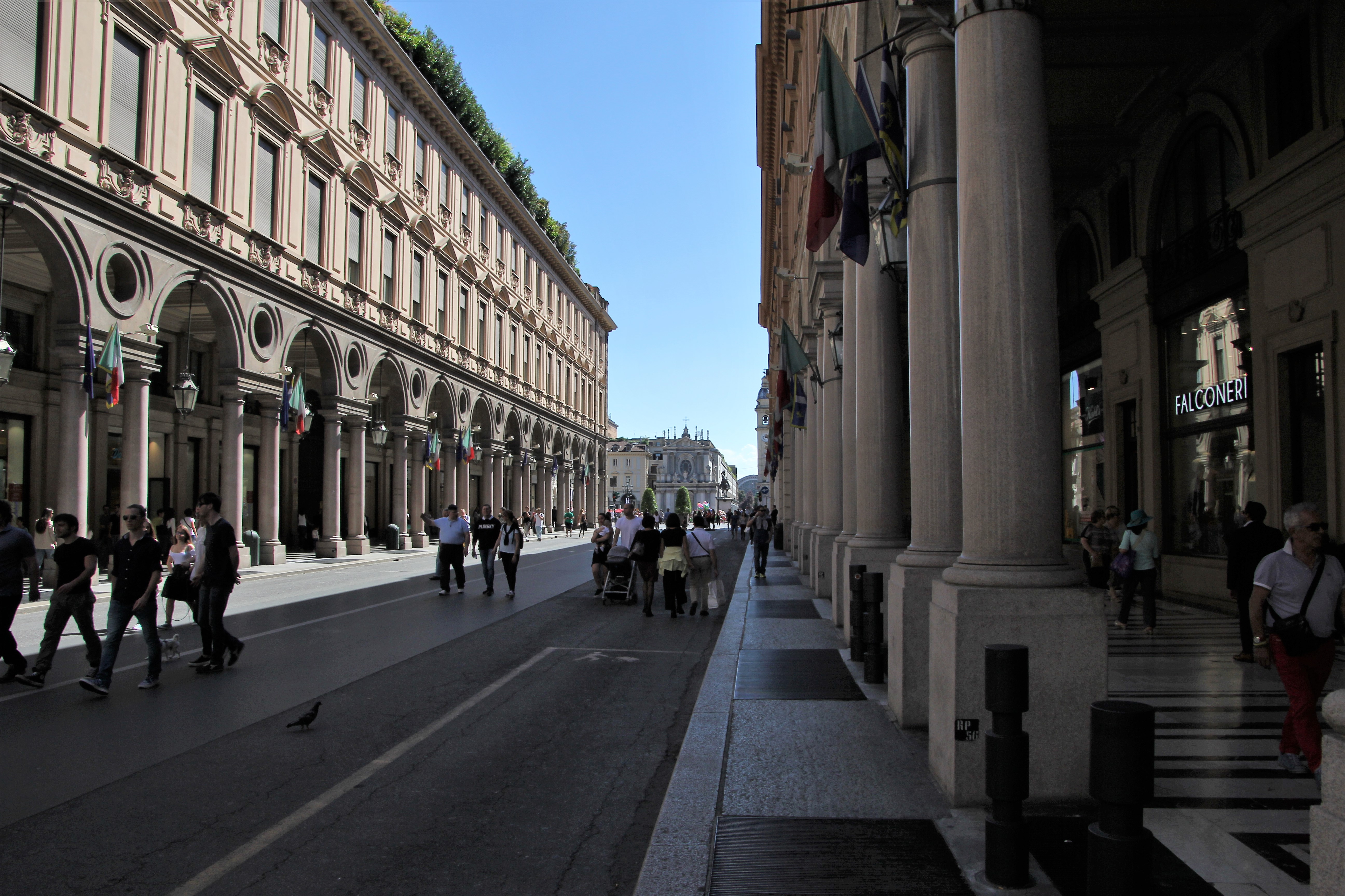 Torino, via Roma